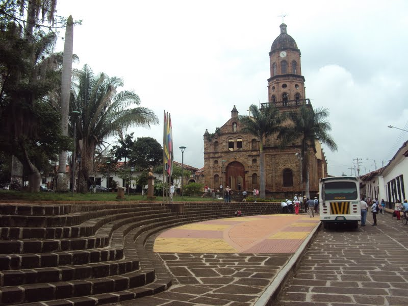 Iglesia del municipio de curiti